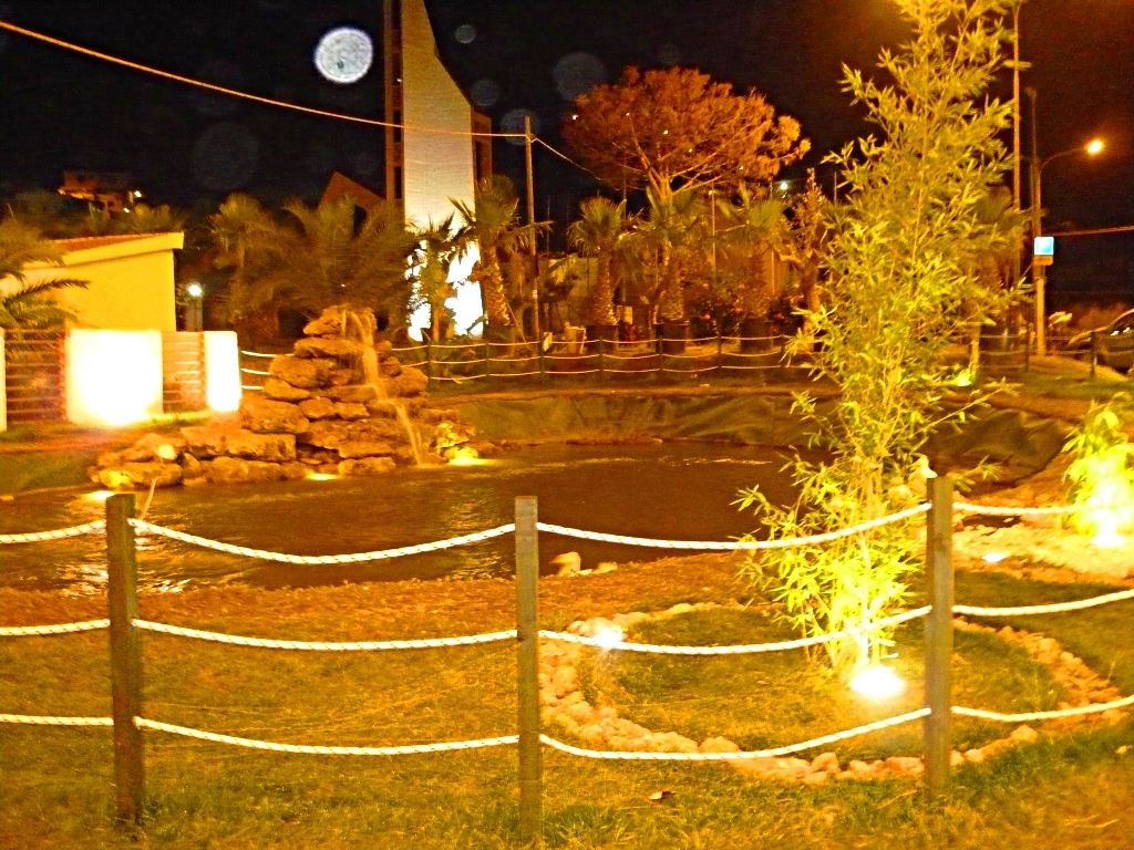 Il lago artificiale con cascata a Lago, frazione di castellabate (salerno)